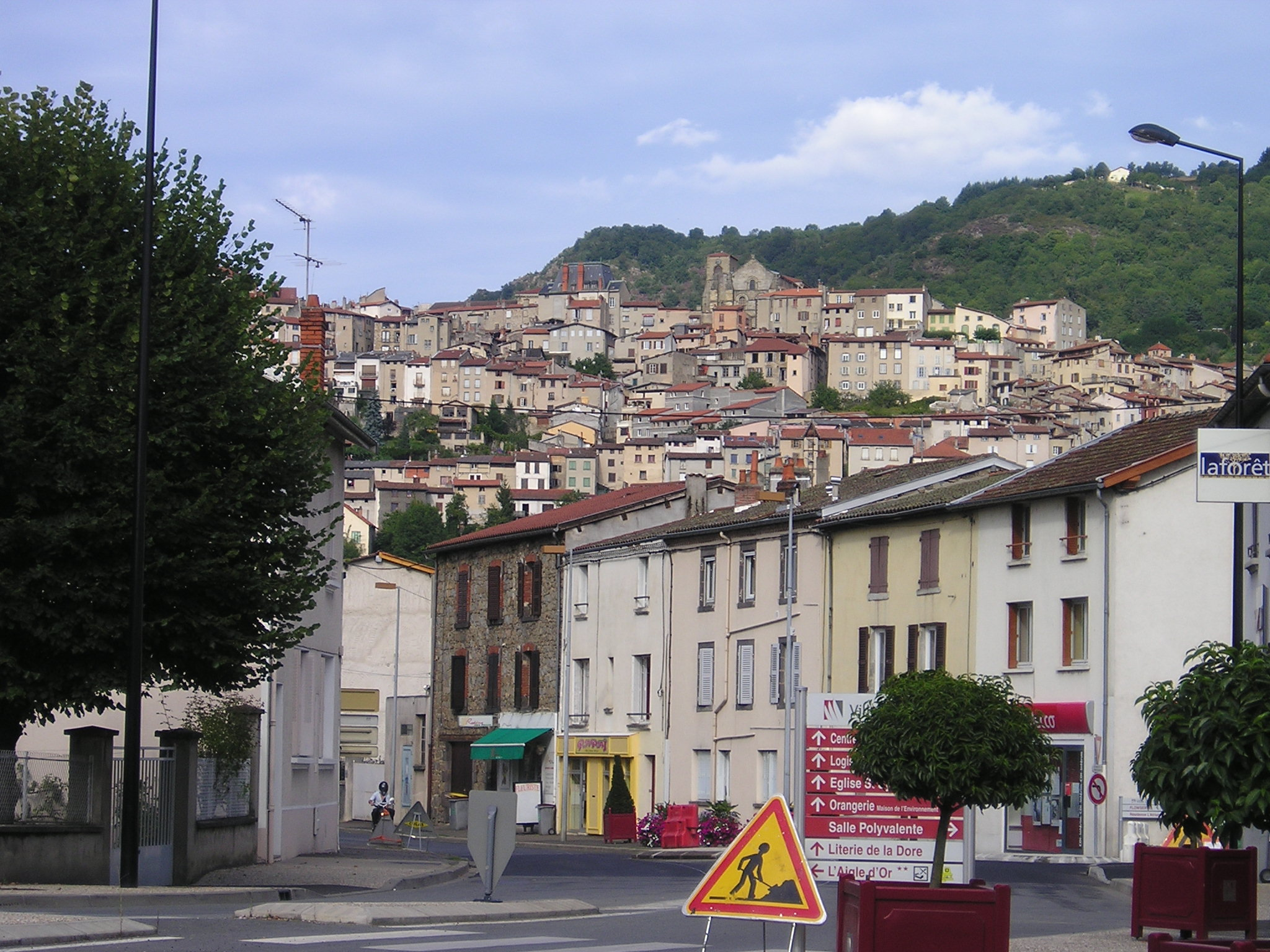 Thiers (Puy-de-Dôme) am Duronne-Hang